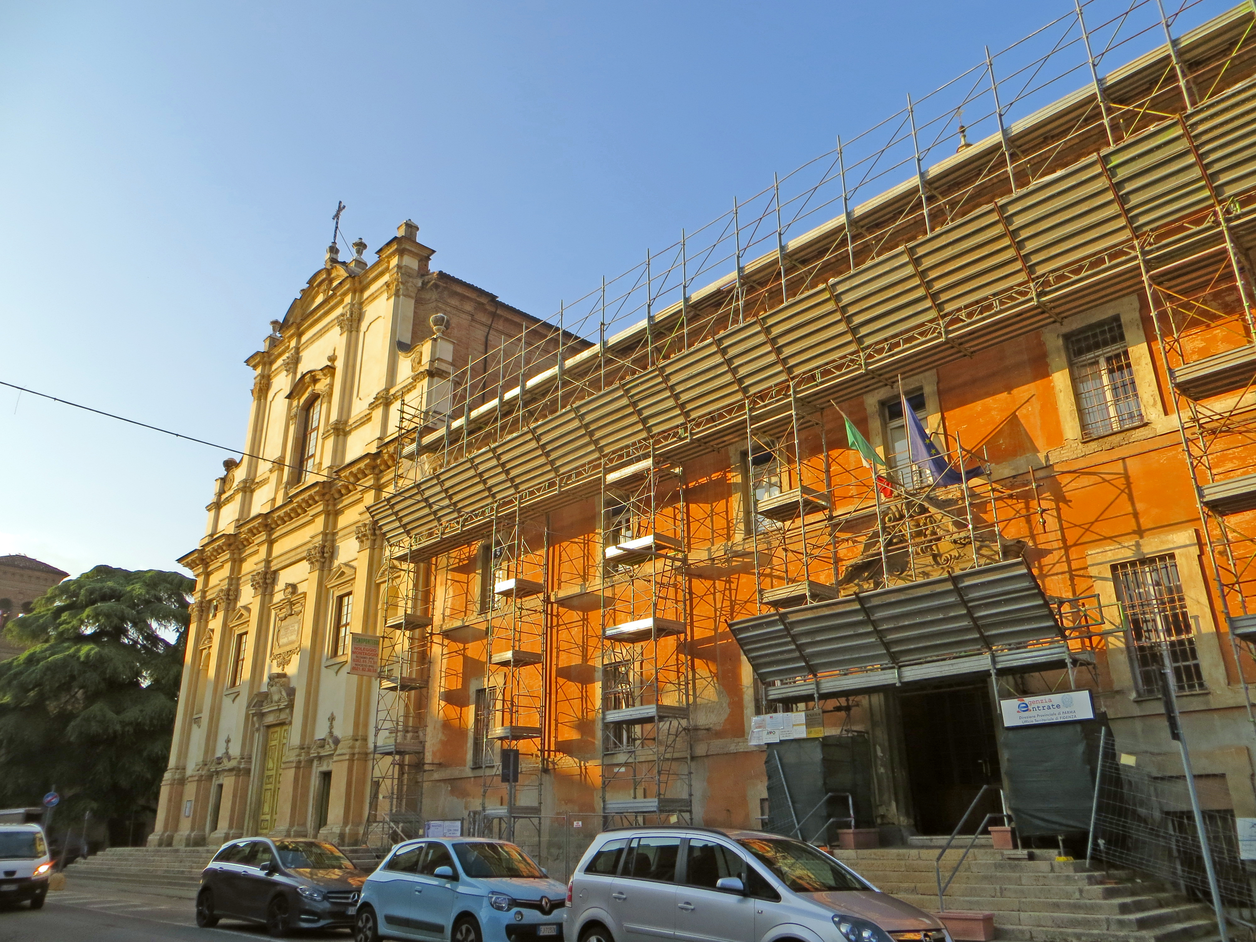 Via Agostino Berenini (Fidenza) - santuario della Gran Madre di Dio e collegio dei Gesuiti